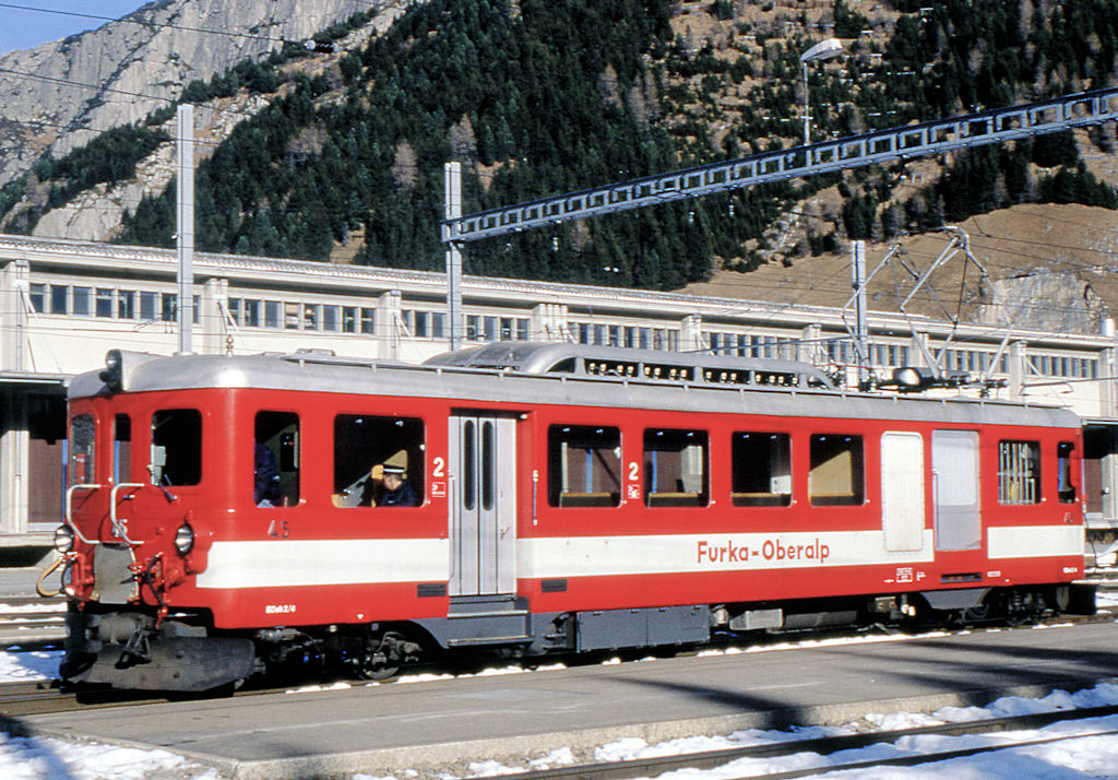 FO BDeh 2/4 45 in Andermatt